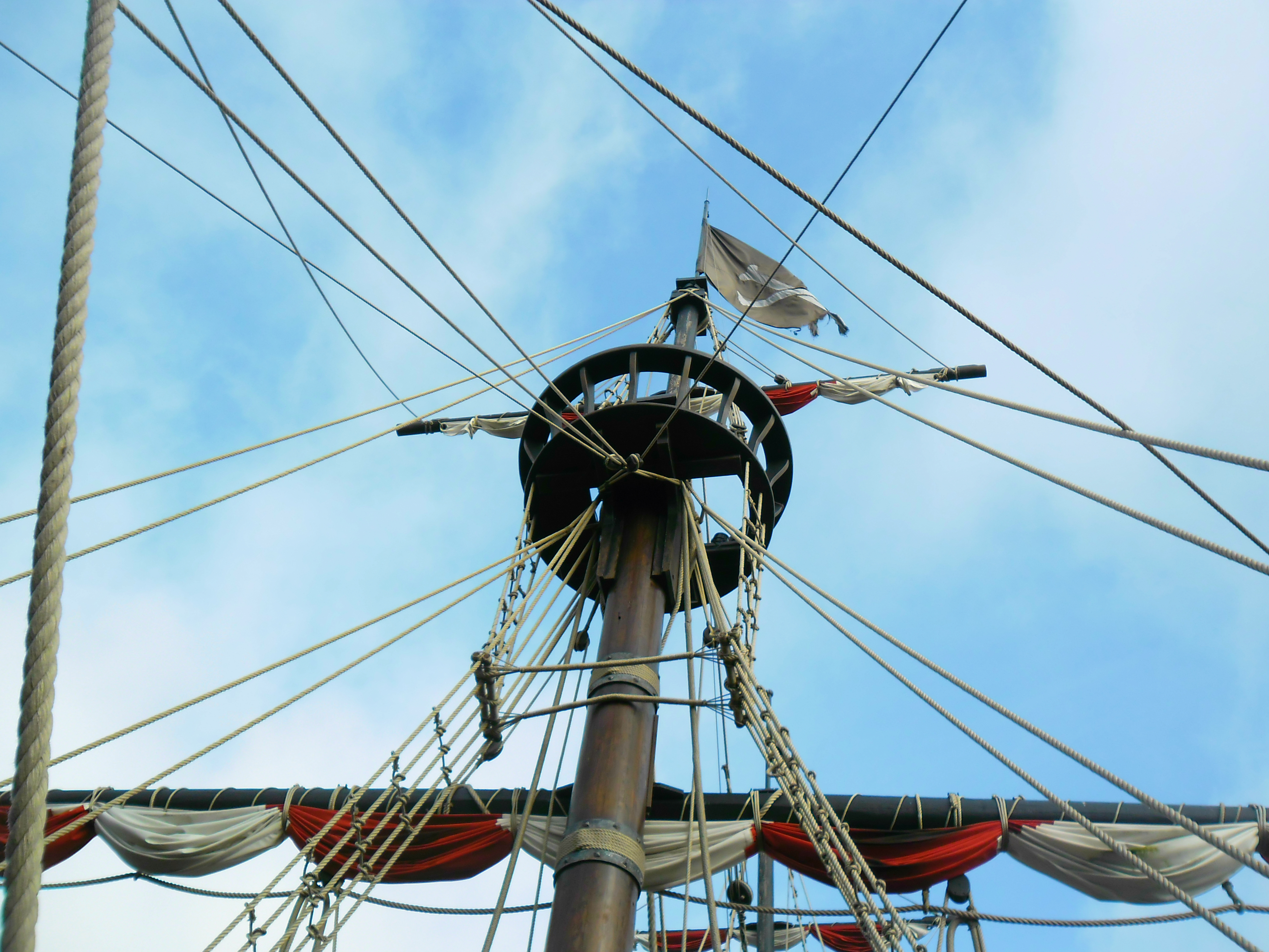 Bateau pirate